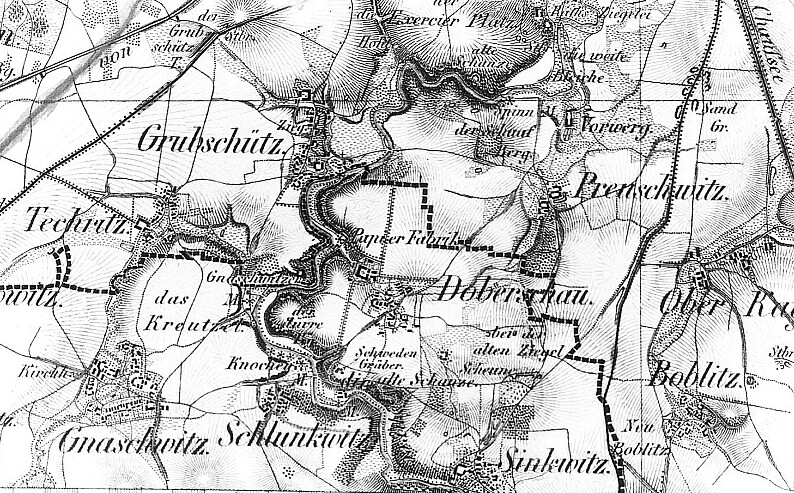 Original image description from the Deutsche Fotothek Doberschau-Gaußig-Grubschütz. Oberreit, Sect. Bautzen, 1844/46